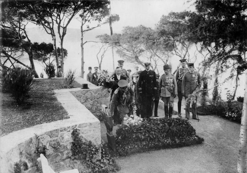 Kaisertage in Konstantinopel. Der Kaiser legt am Grabe des Feldmarschalls von der Goltz-Pascha im Botschaftspark Blumen nieder. 3. von rechts: Essad Pascha Aufgenommen durch: Filmtrupp Nr. 4. Ort: Konstantinopel. Zeit: Oktober 1917